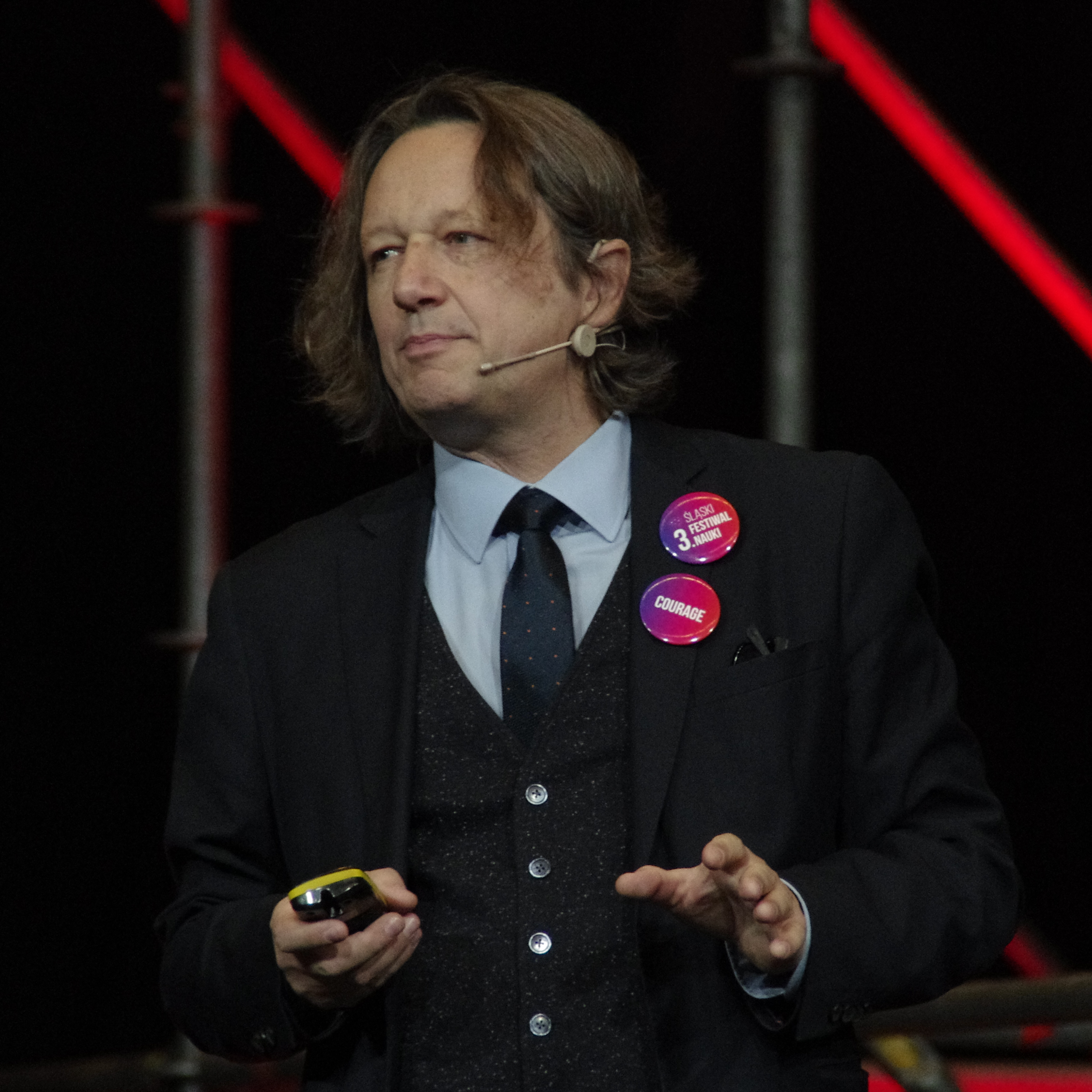 Ryszard Koziołek (ur. 23 marca 1966 w Bielsku-Białej) – polski literaturoznawca, historyk literatury, profesor doktor habilitowany nauk humanistycznych, profesor nadzwyczajny Uniwersytetu Śląskiego w Katowicach. Zdjęcie wykonane podczas prelekcji Ryszarda Koziołka w Międzynarodowym Centrum Kongresowym w Katowicach podczas 3. Śląskiego Festiwalu Nauki.